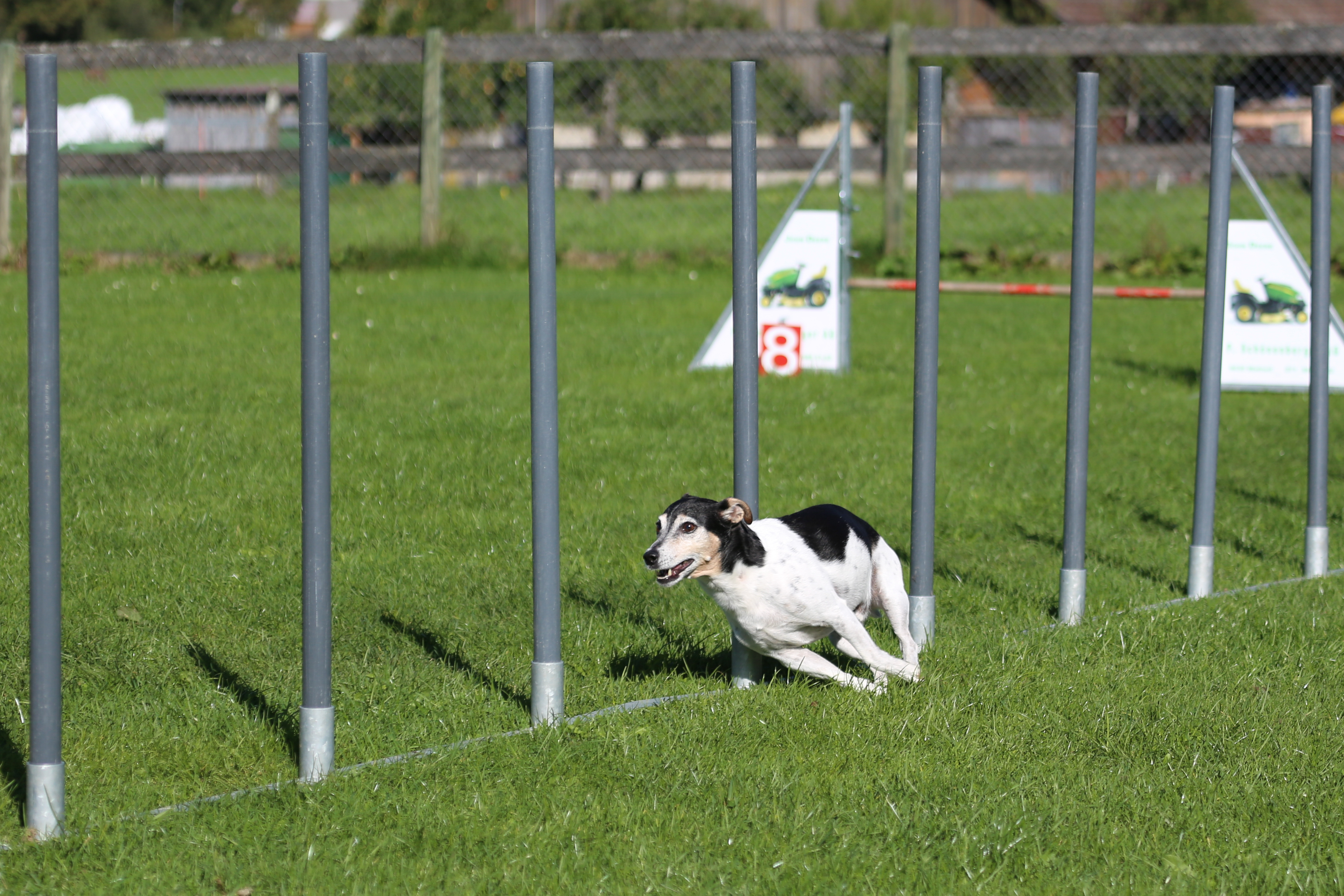 Agility-Wettkampf in der Ostschweiz – Jack Russell Terrier beim Slalom